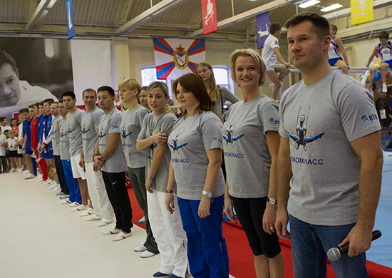 Открытый мастер-класс для юных спортсменов ЦСКА